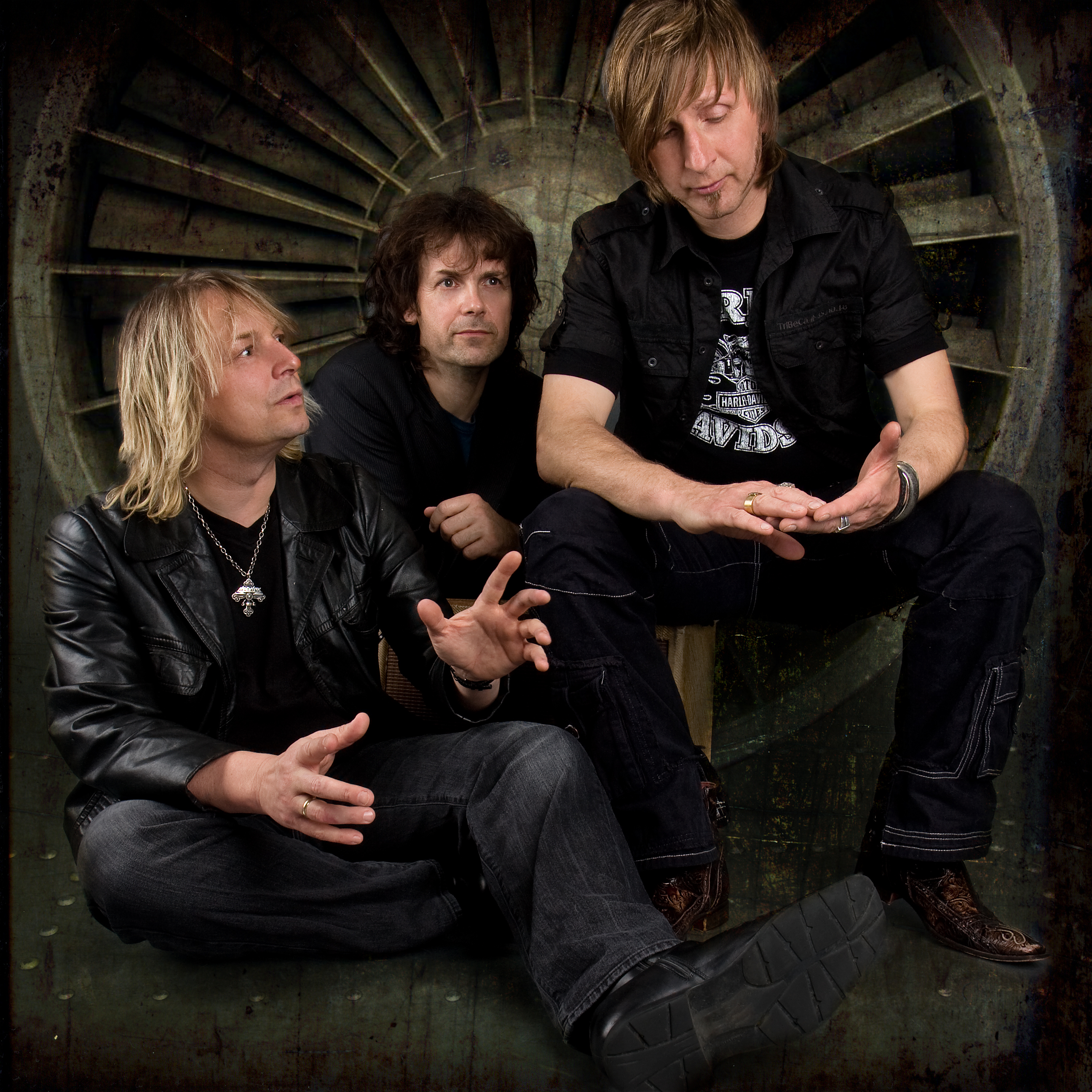 Band Mad Max in der Besetzung von 2009